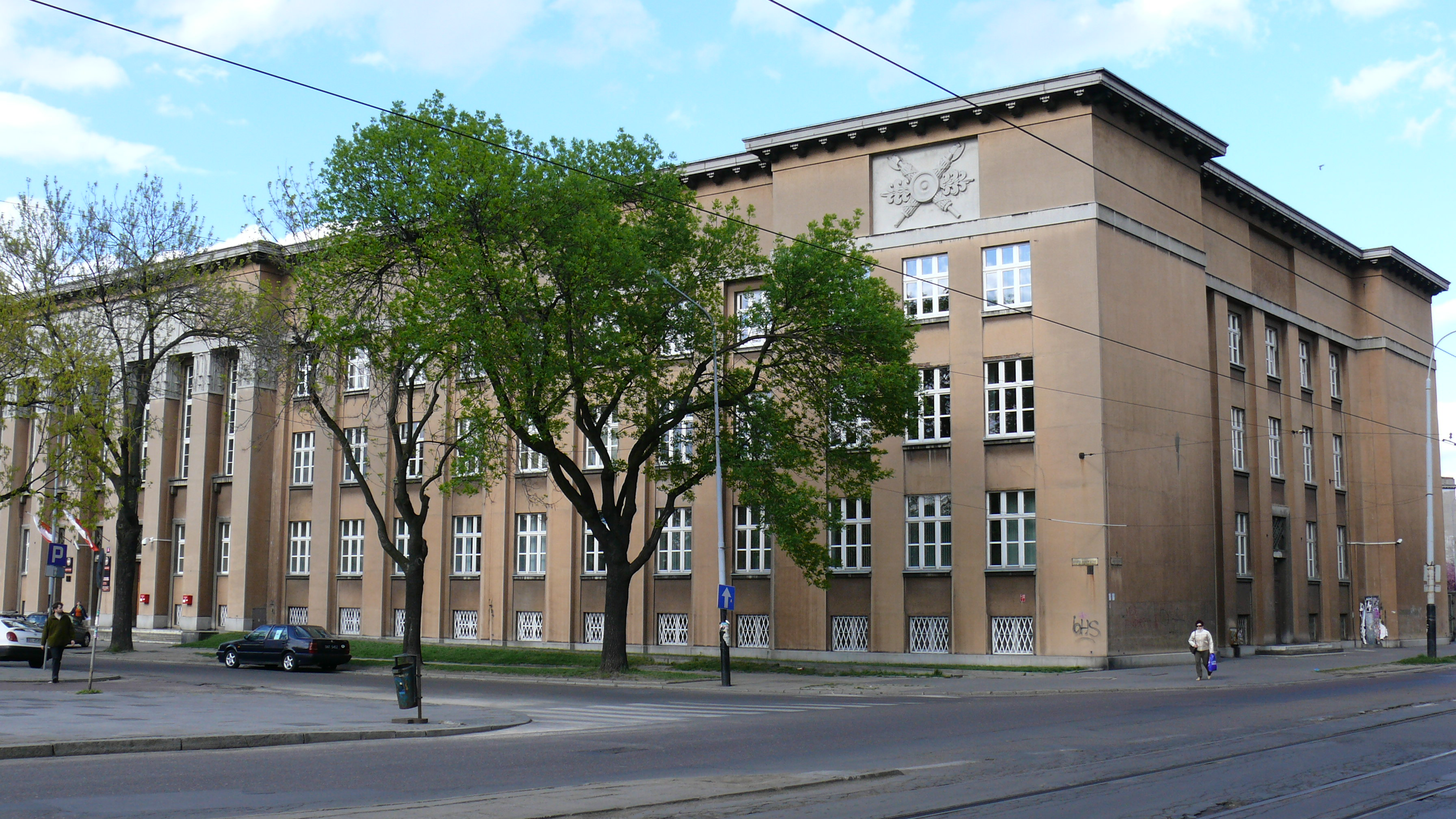 Sąd Okręgowy w Łodzi